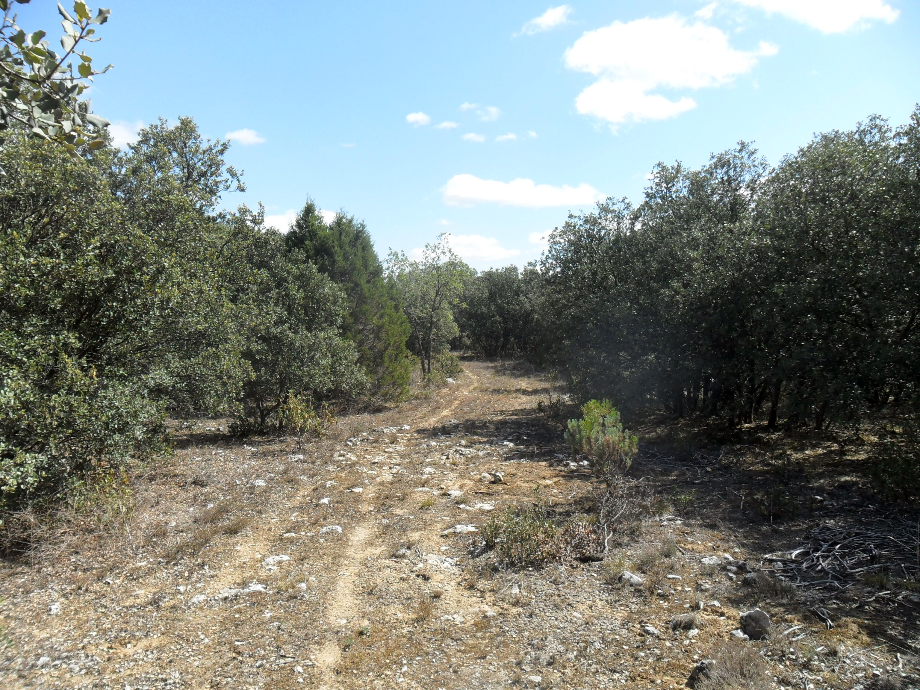 LIC El Carrascal Valladolid